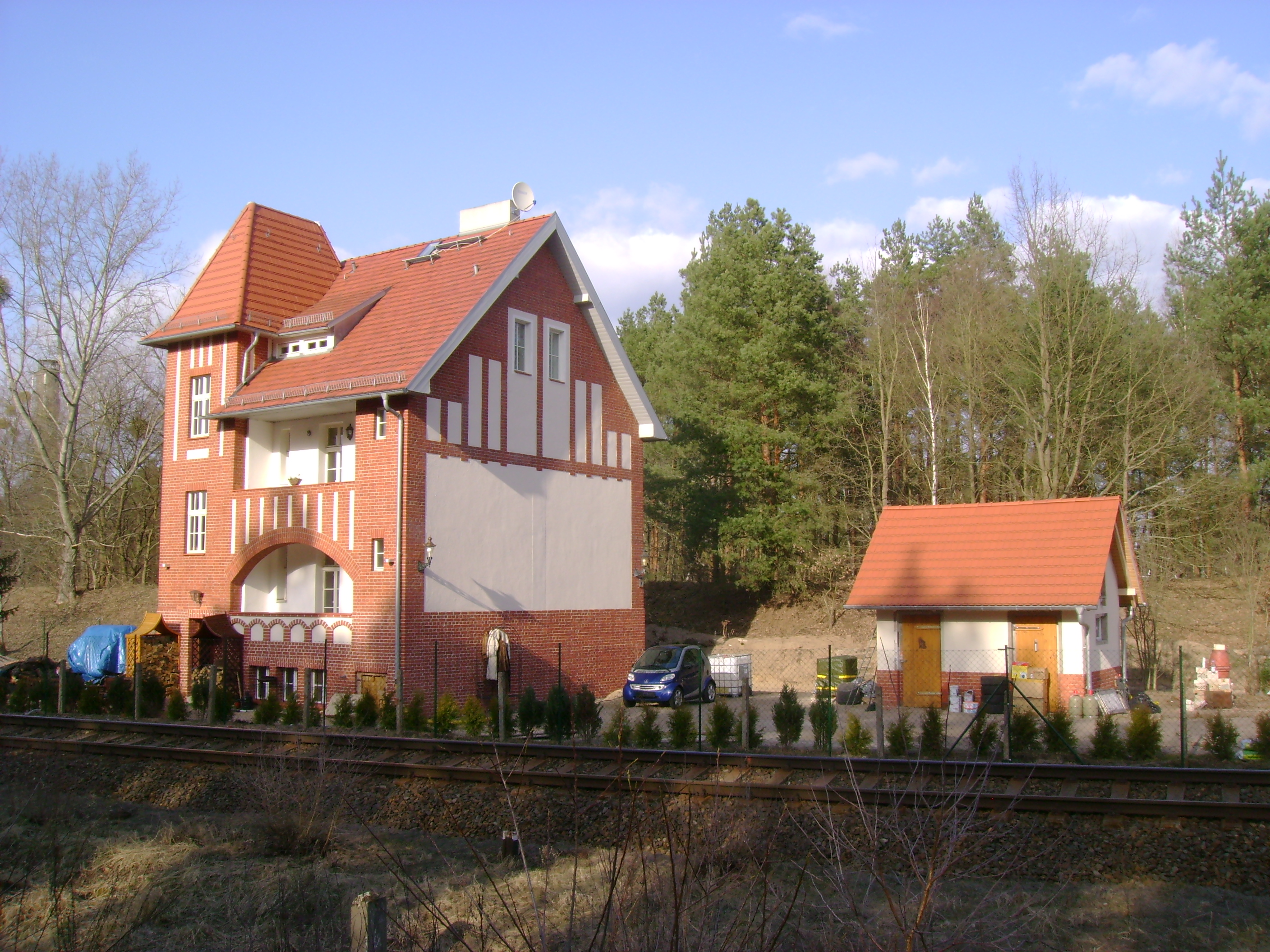 Denkmalgeschütztes Wohnhaus in Velten Berliner Straße 9. Die ehemalige Blockstelle Jägerberg steht zwischen den ehemaligen Haltepunkten Hennigsdorf-Nord und Hohenschöpping.